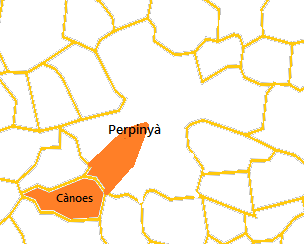 Mapa del Cantó de Perpinyà 5 elaborat a partir d'un mapa de lliure disposició